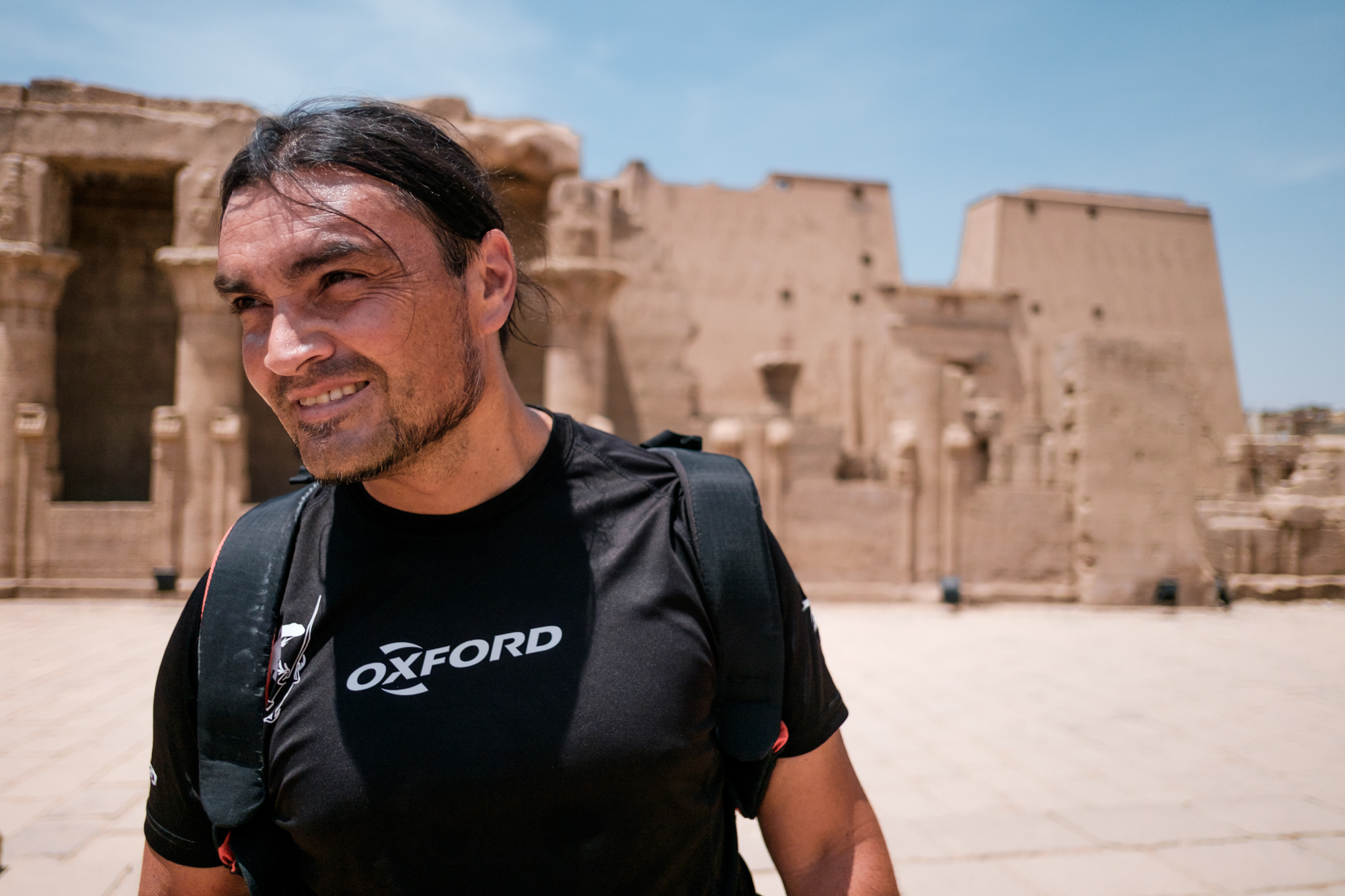 En Egipto